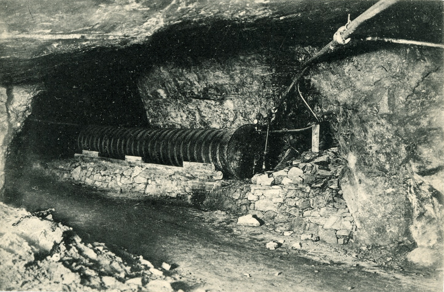 Miltitz; Gang im Kalkwerk This postcard is from publisher Brück & Sohn in Meißen ( postcard has a unique number 11792 and is available in a higher resolution at the publisher. This images was uploaded in a cooperation project between Wikipedians and the publisher.